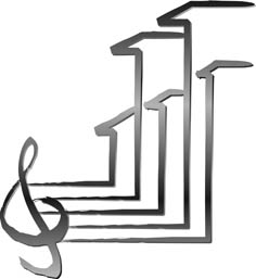 logo della Scuola Popolare di Musica Donna Olimpia, che rappresenta l'unione tra la chiave di violino, il pentagramma con i grattacieli delle case popolari del quartiere donna olimpia